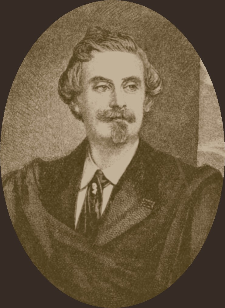 Adolf Friedrich Graf von Schack